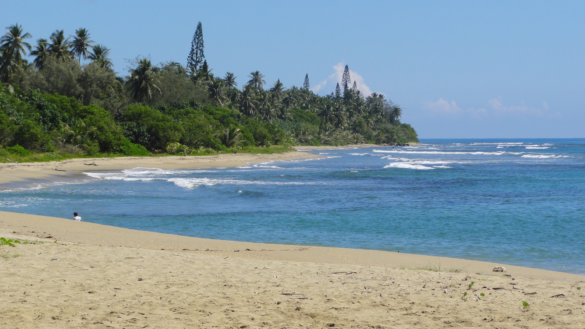 Plage de Poindimié